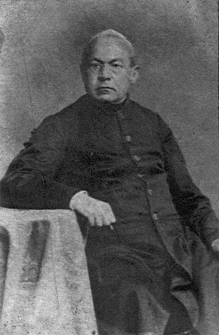 Lichtbild der Pfarrers und Abgeordneten Johann Baptist Diebold (1807-1885)